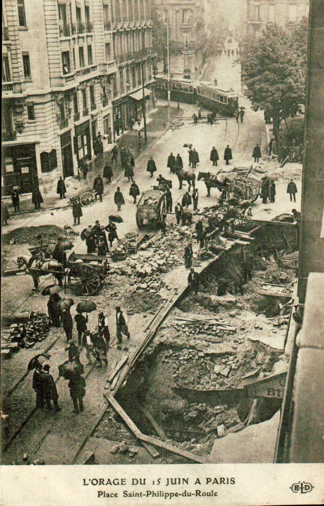 Orage du 15 Juin 1914 / Sol effondré Place Saint Philippe du Roule